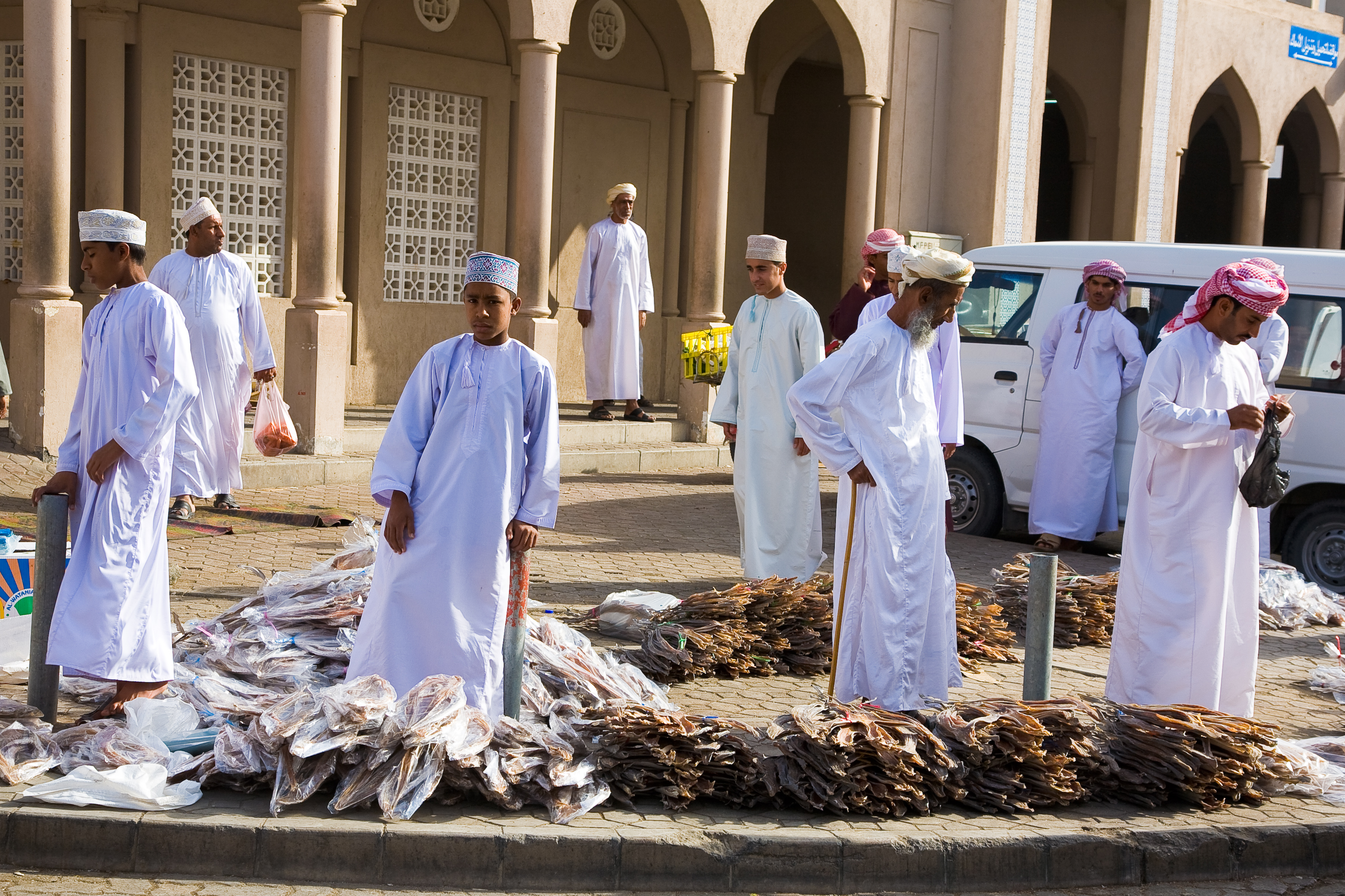 Vendors in Nizwa souk